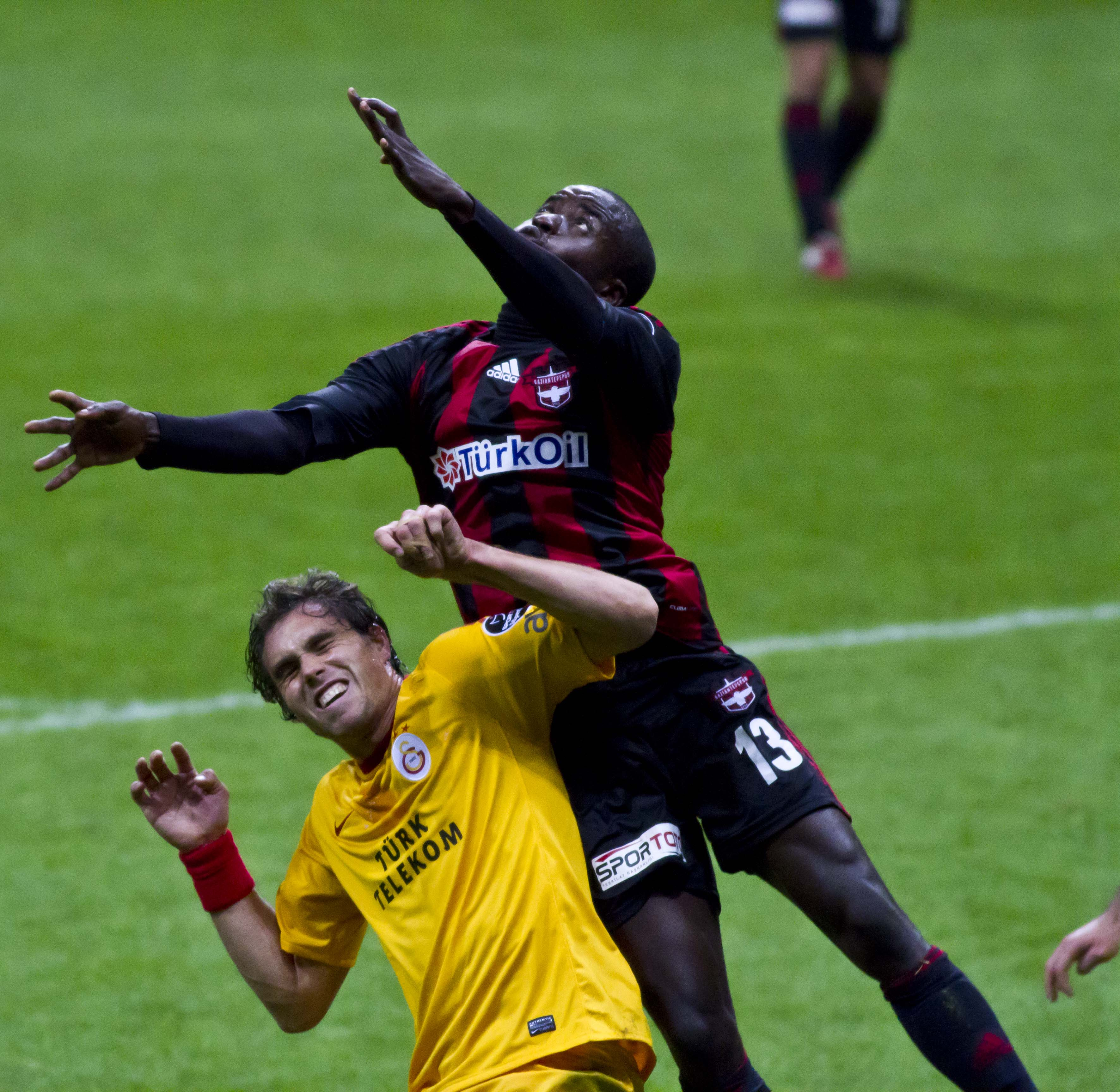 Türkiye Spor Toto Süper Lig 2011/2012 26.10.2011 20:32 Türk Telekom Arena Galatasaray2 - 4 Gaziantepspor Selçuk İnan (1-0) 7' Muhammet Demir (1-1) 33' Ivelin Popov (1-2) 37' Johan Elmander (2-2) 64' Orhan Güller (2-3) 68' Cenk Tosun (2-4) 88'